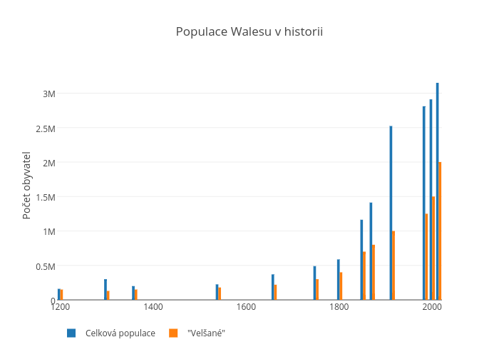 Zdroj: JONES, Gareth Elwyn a Dai SMITH (eds.). The people of Wales. 2. imp. Llandysul: Gomer, 2000. BBC Radio Wales. ISBN 1859027431.